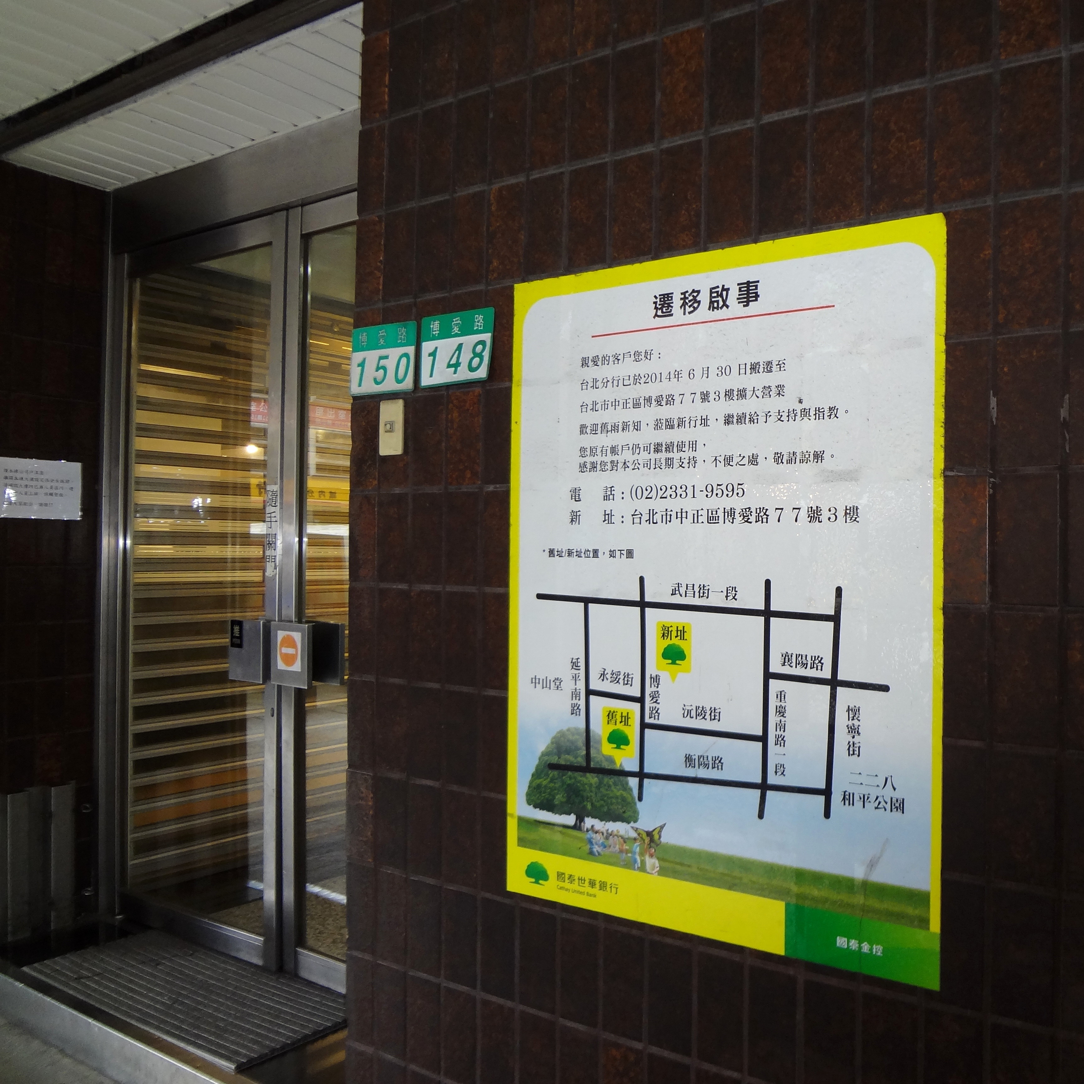 國泰金融大樓（舊菊元百貨）大門，右側張貼國泰世華銀行臺北分行遷移啟事。